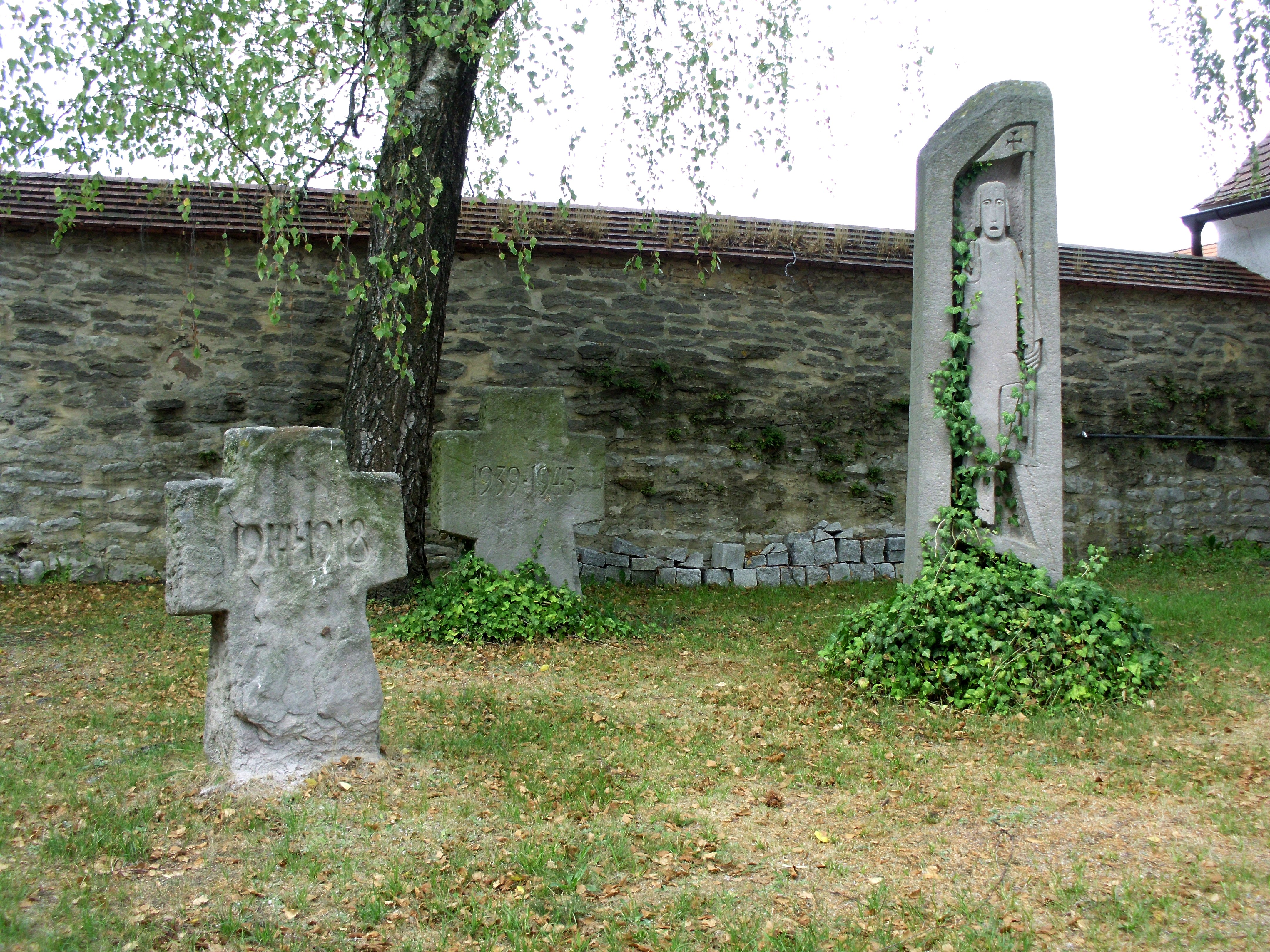 Sulzkirchen, Ortsteil von Freystadt im oberpfälzischen Landkreis Neumarkt in Bayern, Kriegerdenkmal im Kirchhof